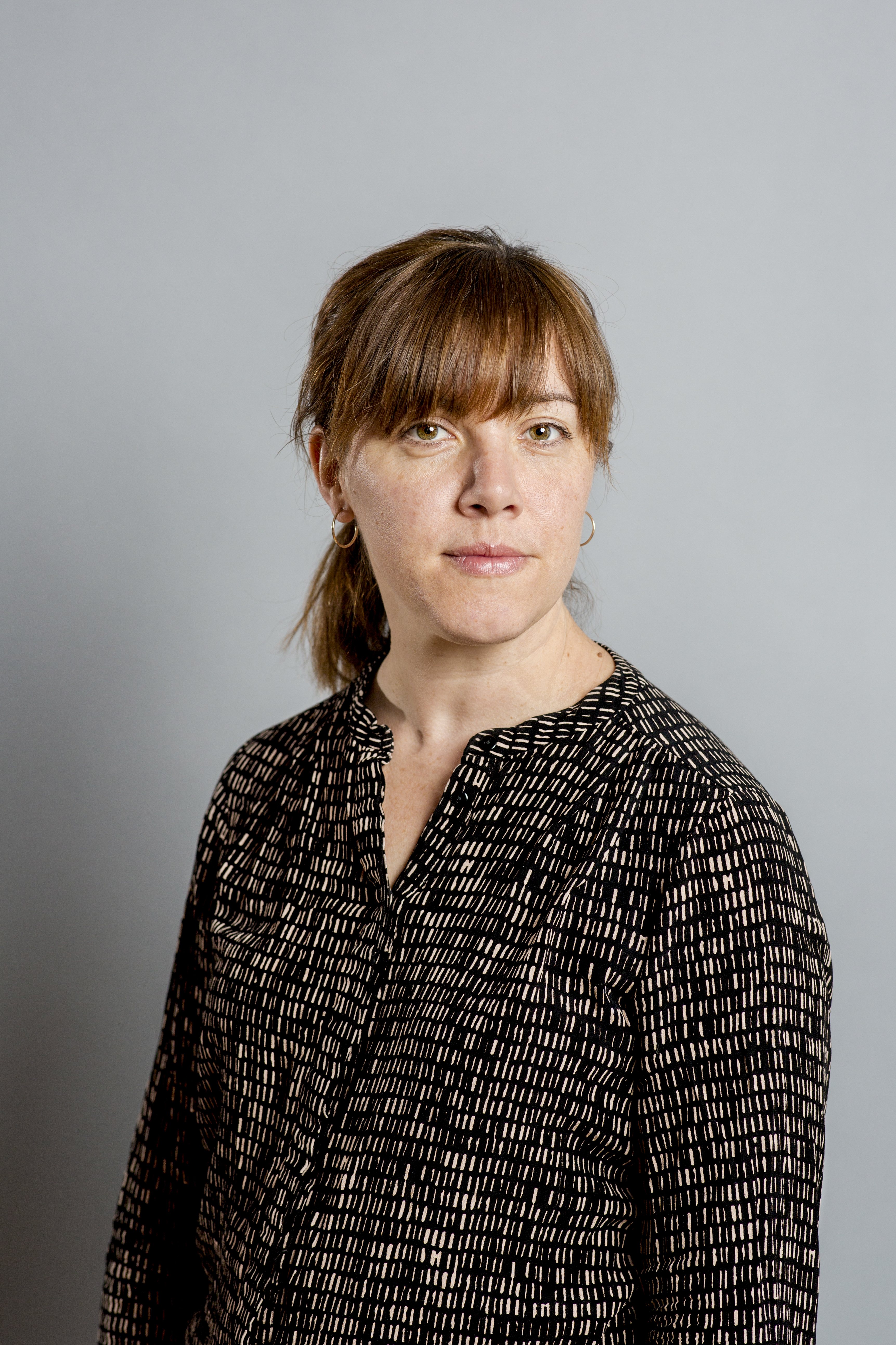 Vasiliki Tsouplaki. Vänsterpartiet. 2018.